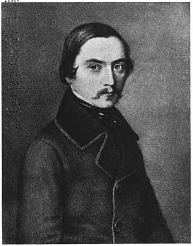 Chlodwig zu Hohenlohe-Schillingsfürst im Jahre 1846